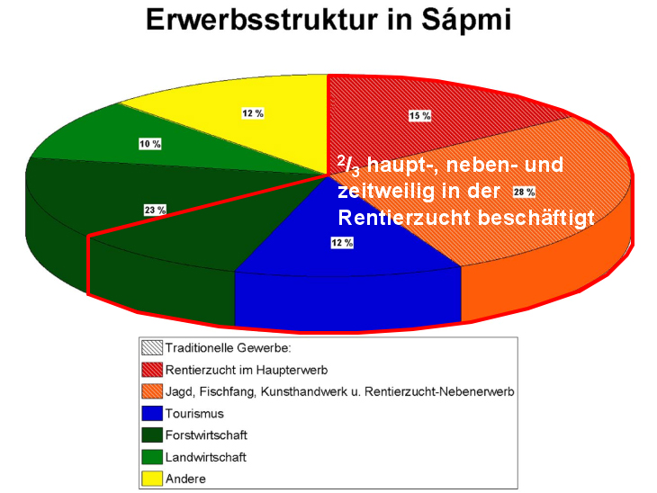 Erwerbsstruktur der Samen in Lappland